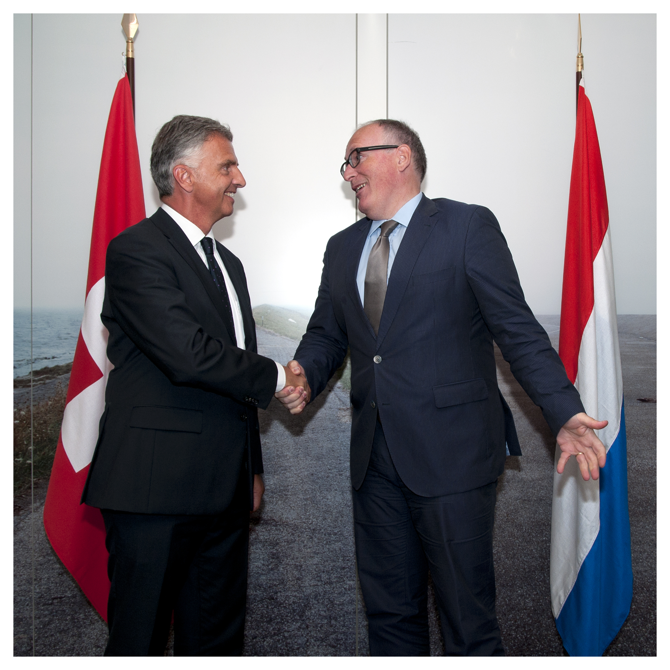 130826 Burkhalter Zwitserland bij Timmermans 4522